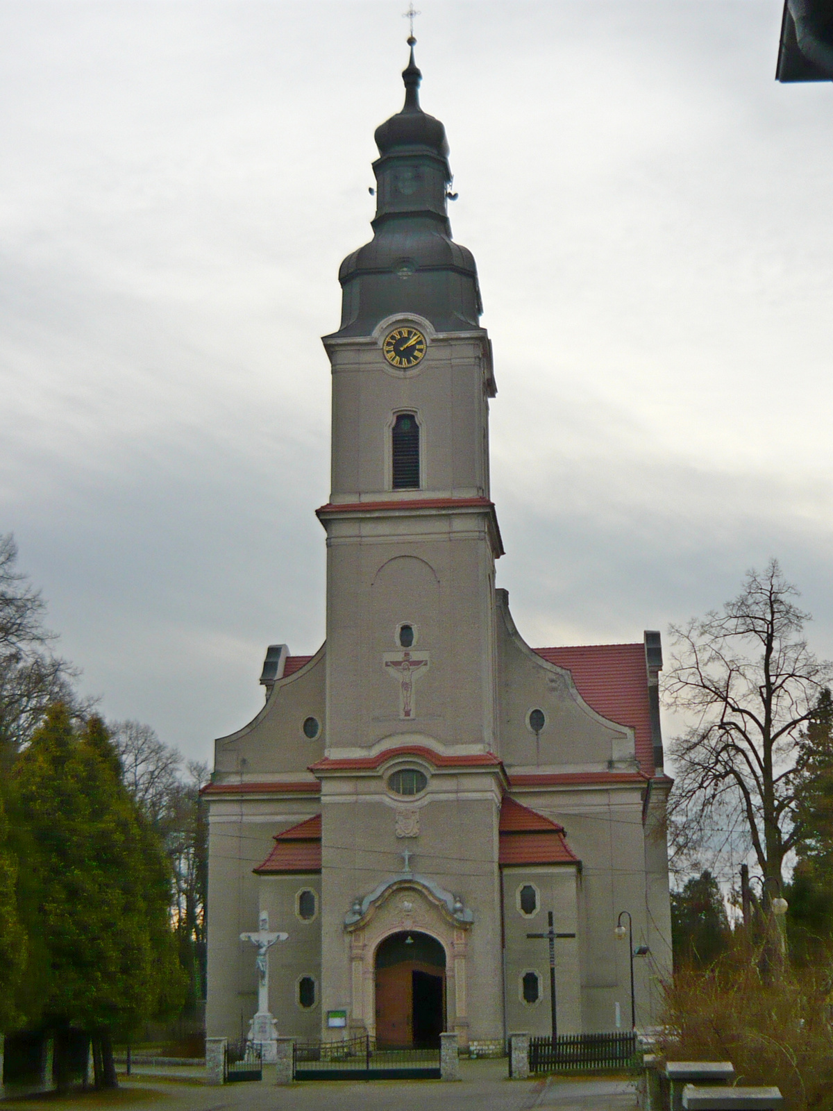 Kościół Podwyższenia Krzyża Świętego w Pokoju.